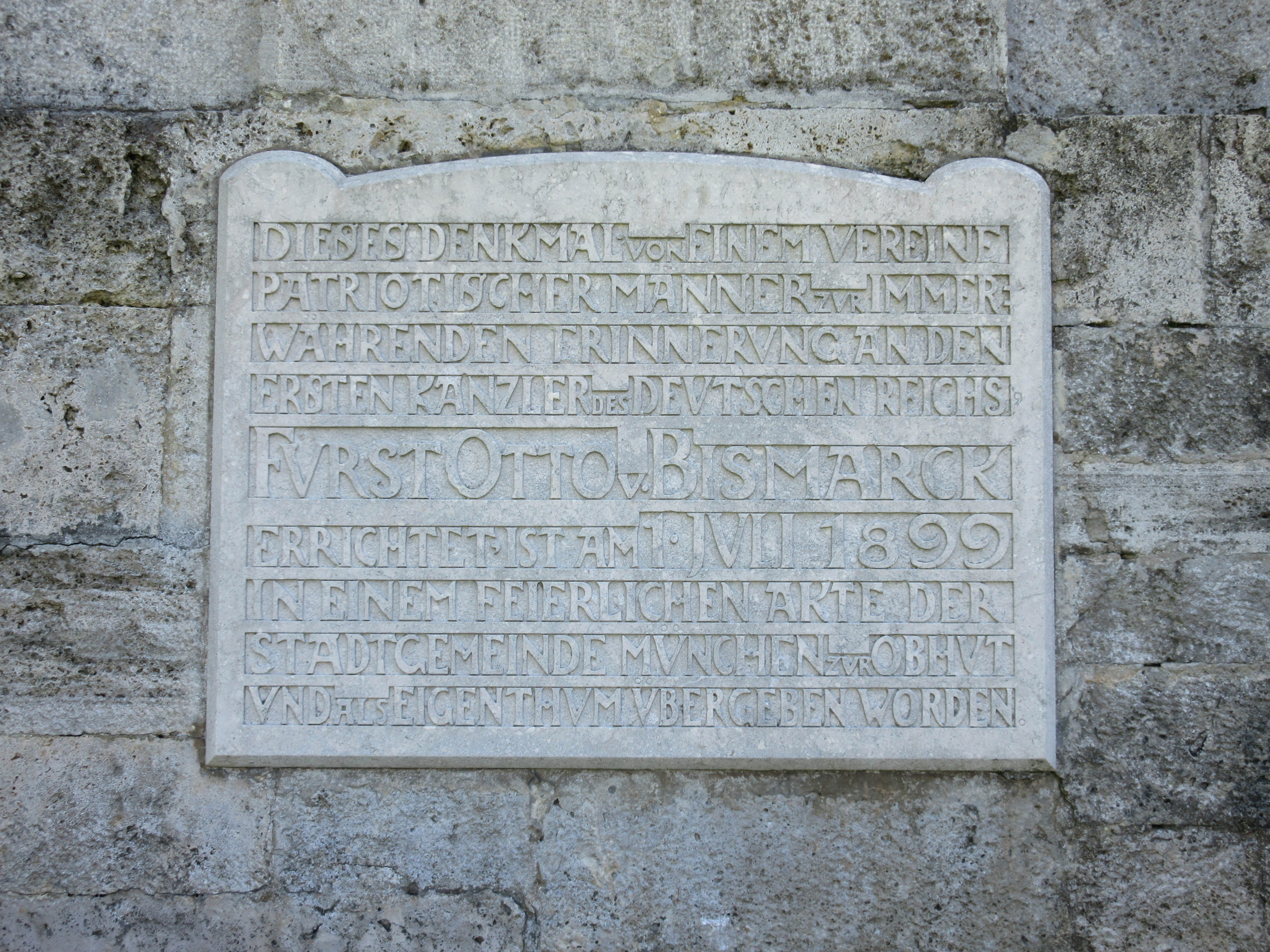 Steingedenktafel an den Einweihungstag 1. Juli 1899 Nordaufgang - Bismarckturm bei Assenhausen über dem Starnbergersee